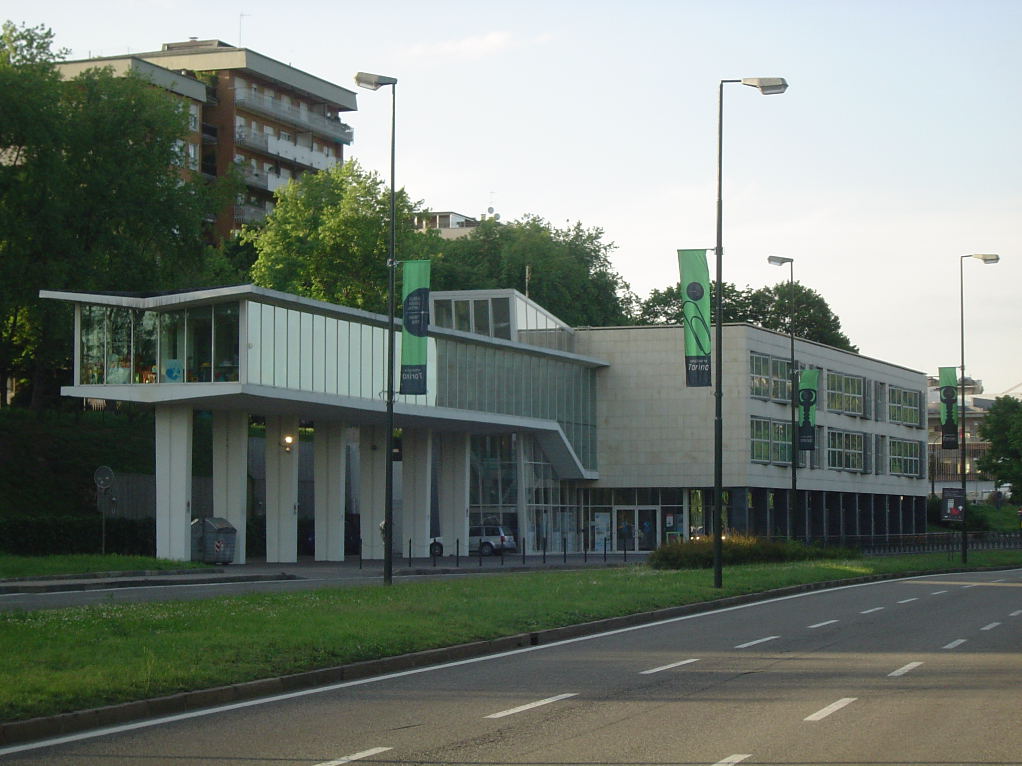 Monorotaia di Torino - Ex Stazione Nord (ora Stazione Regina) 2008 - Centro d'accoglienza dell'Ospedale Infantile Regina Margherita